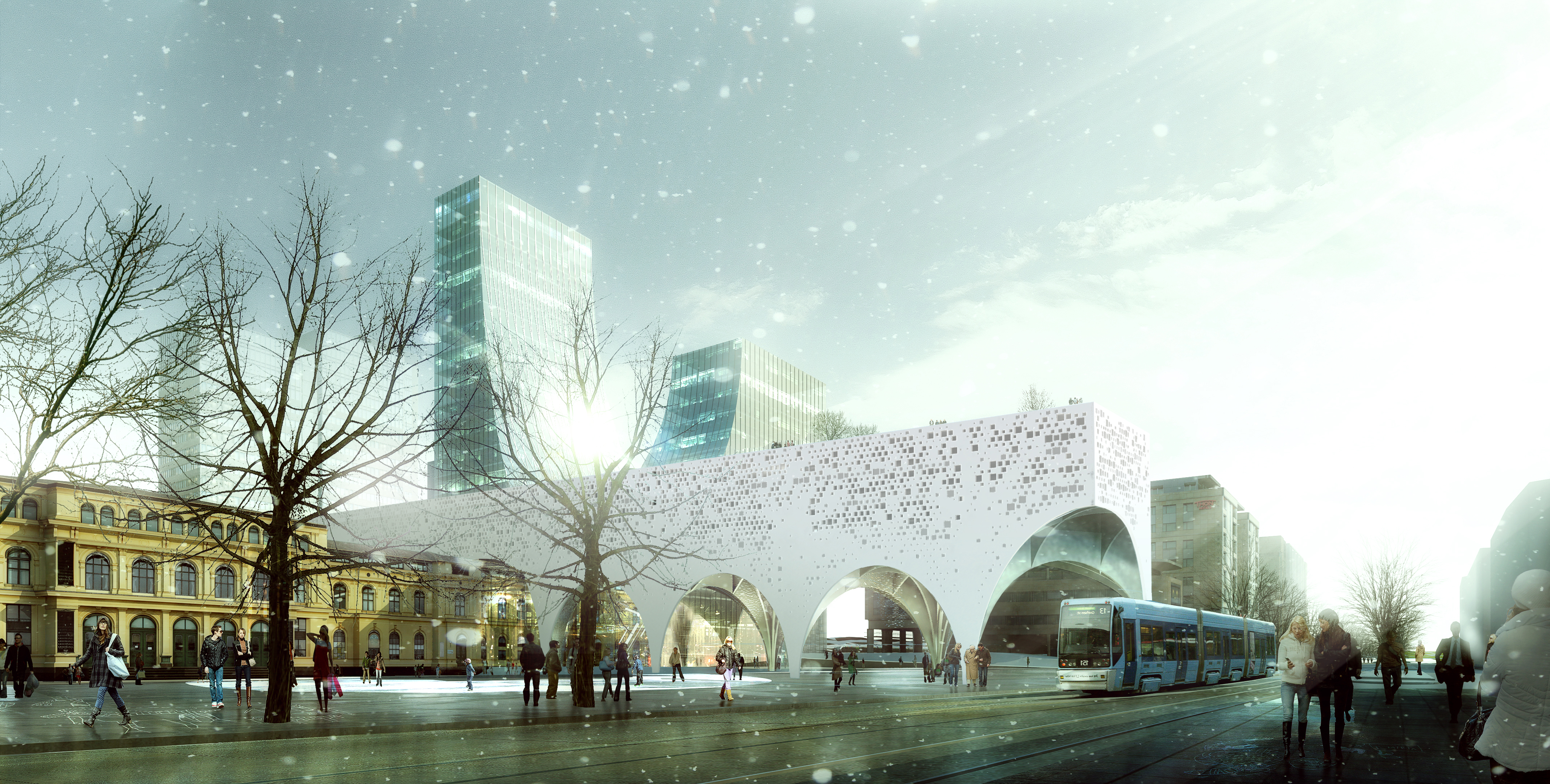 nye Chr._Fredriks_Plass_og_Dronning_Eufemias_gate.jpg